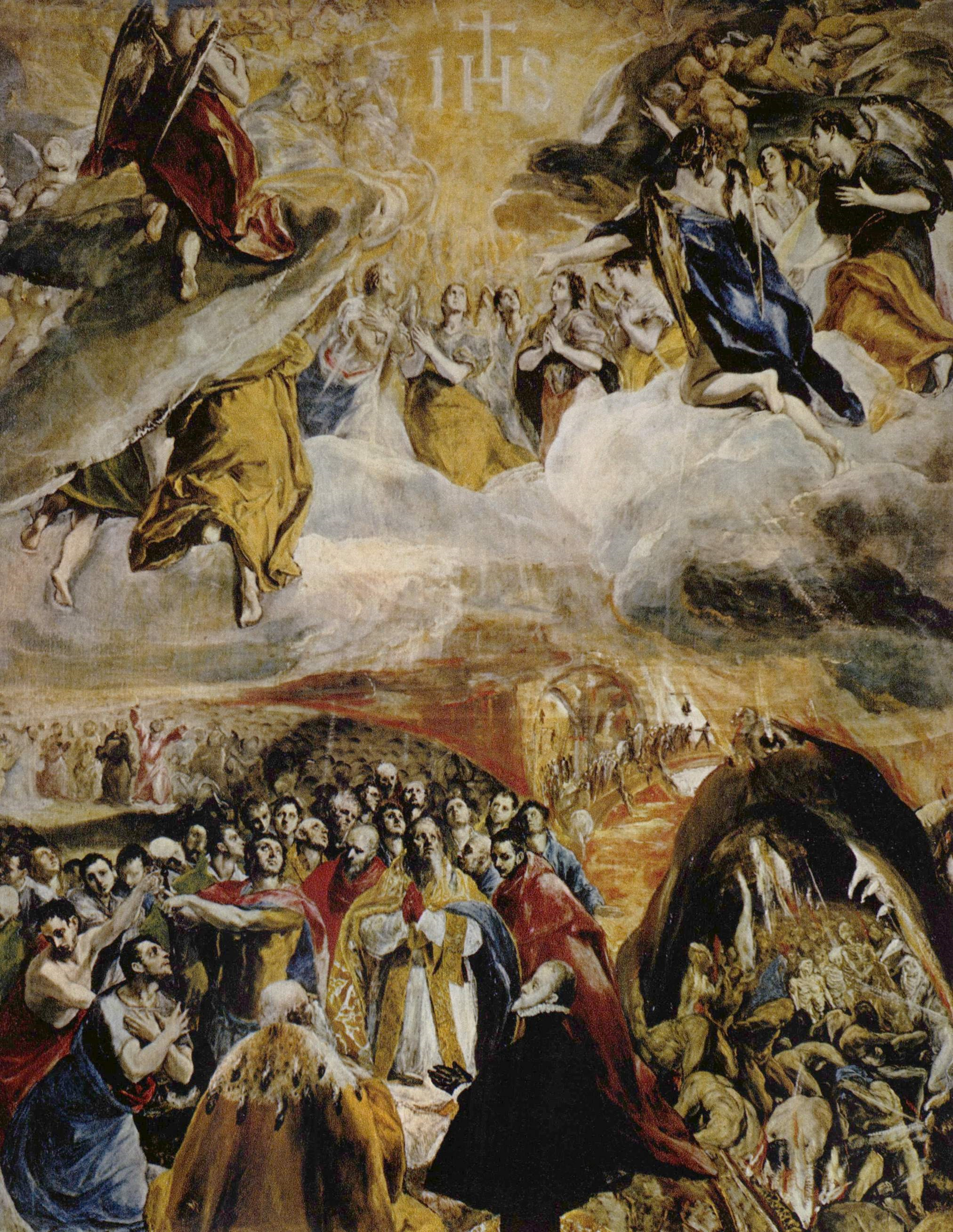 Esta obra, conocida como Adoración del nombre de Jesús, también es llamada El sueño de Felipe II o Alegoría de la Liga Santa